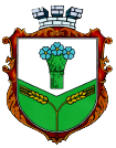 герб смт Пулини